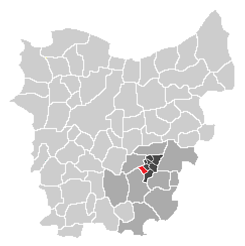 Oost-Vlaanderen uitgeknipt en bewerkt